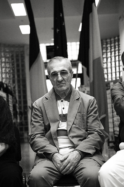 Gheorghe Dinică, plictisit de discursurile provinciale susţinute cu ocazia lansării unei cărţi despre viaţa lui, Cluj-Napoca.